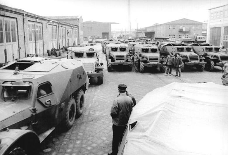 ADN-ZB Bartocha 12.1.90 Neubrandenburg: SPW-Verschrottung - Schützenpanzerwagen der Kampfgruppen werden gegenwärtig verschrottet. Entsprechend dem Ministerratsbeschluß vom 14.12.89 über die Beendigung der Tätigkeit der Kampfgruppen wurde im Reparaturwerk der Bezirksstadt mit der Zerlegung und Verschrottung von SPW aus allen Bezirken der Republik begonnen. (siehe auch 29N)